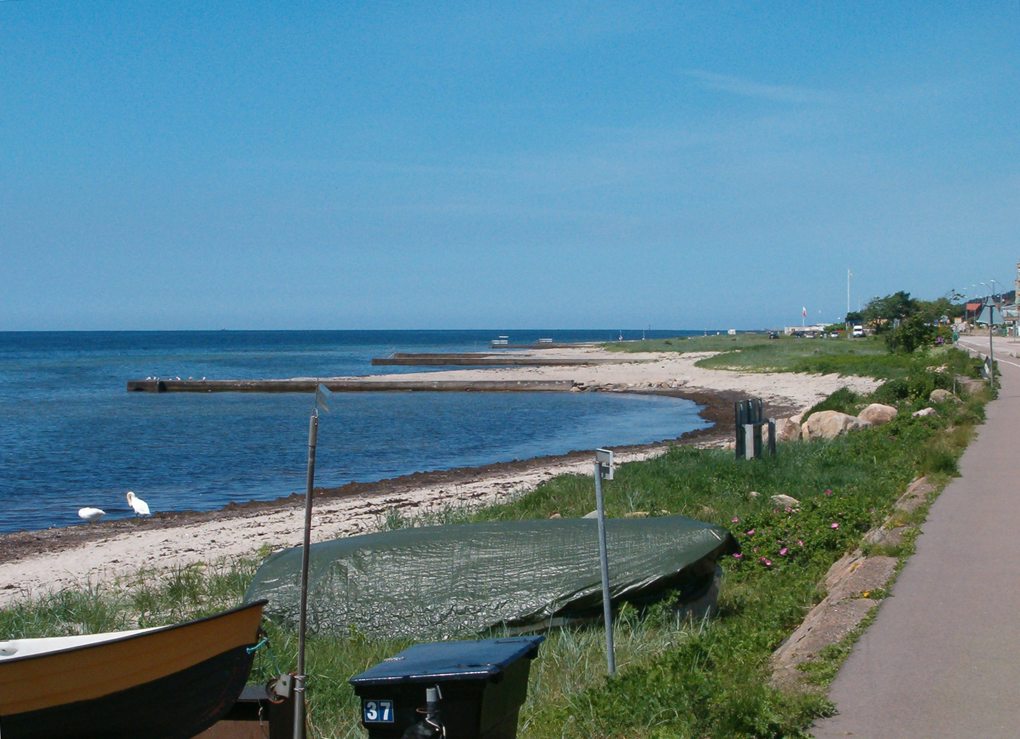 Vikingstrand beach i Helsingborg, Sweden